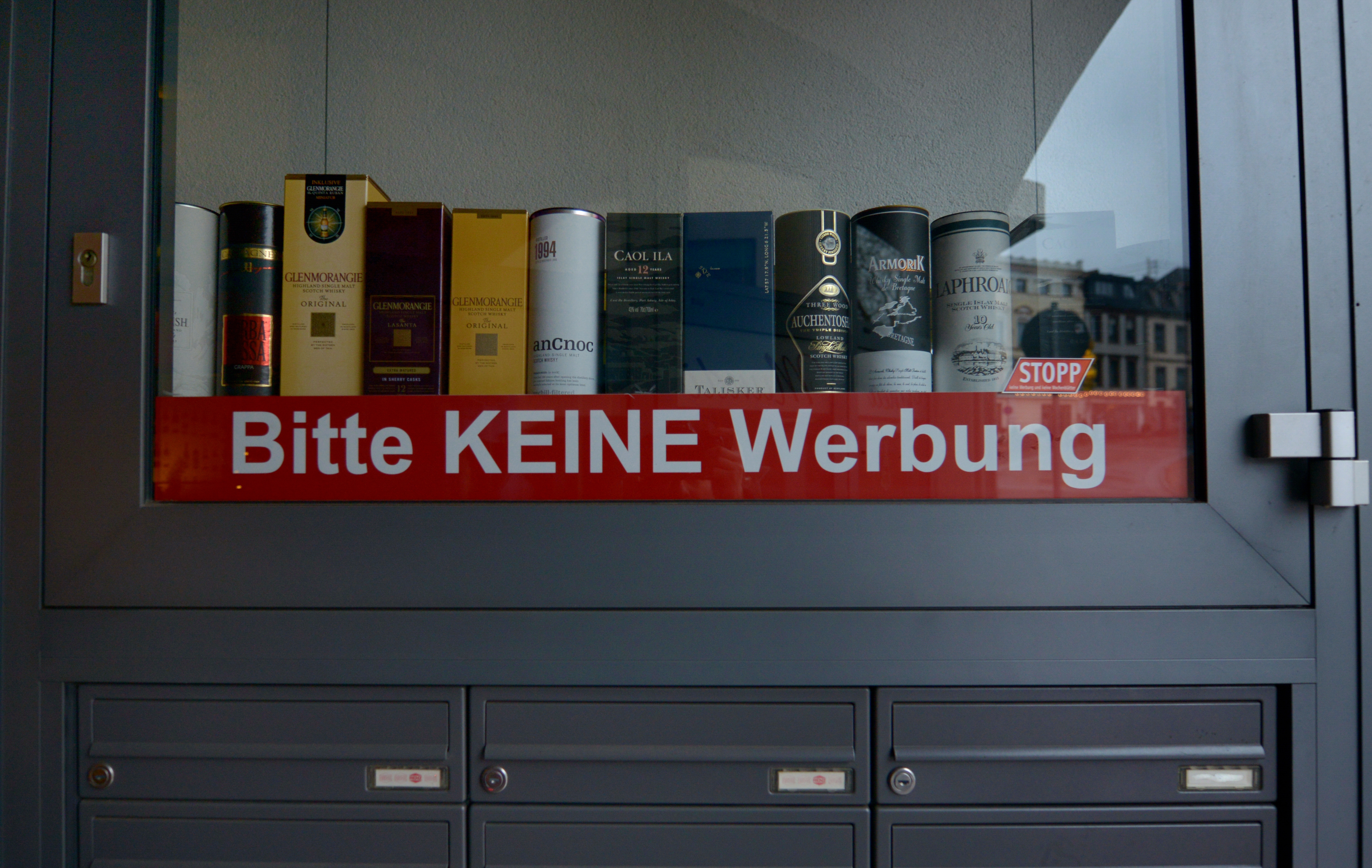 Aufkleber an einer Briefkastenanlage in Illingen, Saarland, Deutschland, Hauptstraße 33.